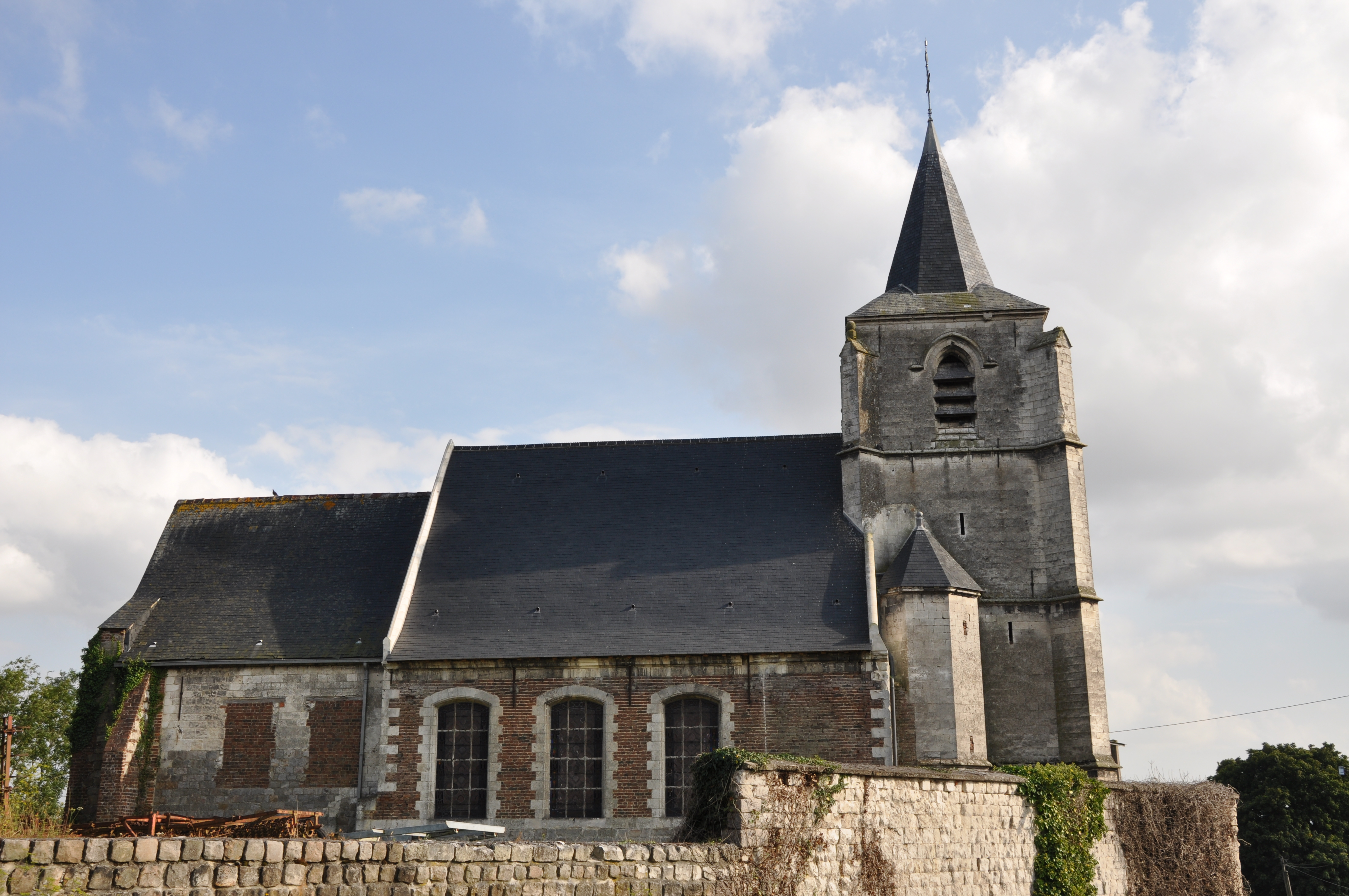 Église Saint-Denis de Hesdigneul-lès-Béthune, (Classé, 1913) .